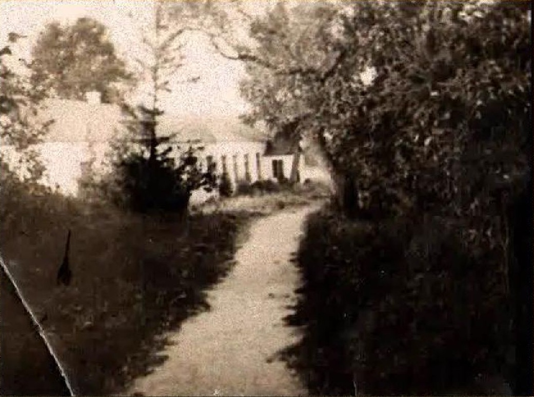 Магчыма, будынак маёнтка Ваньковічаў "Зазер'е".